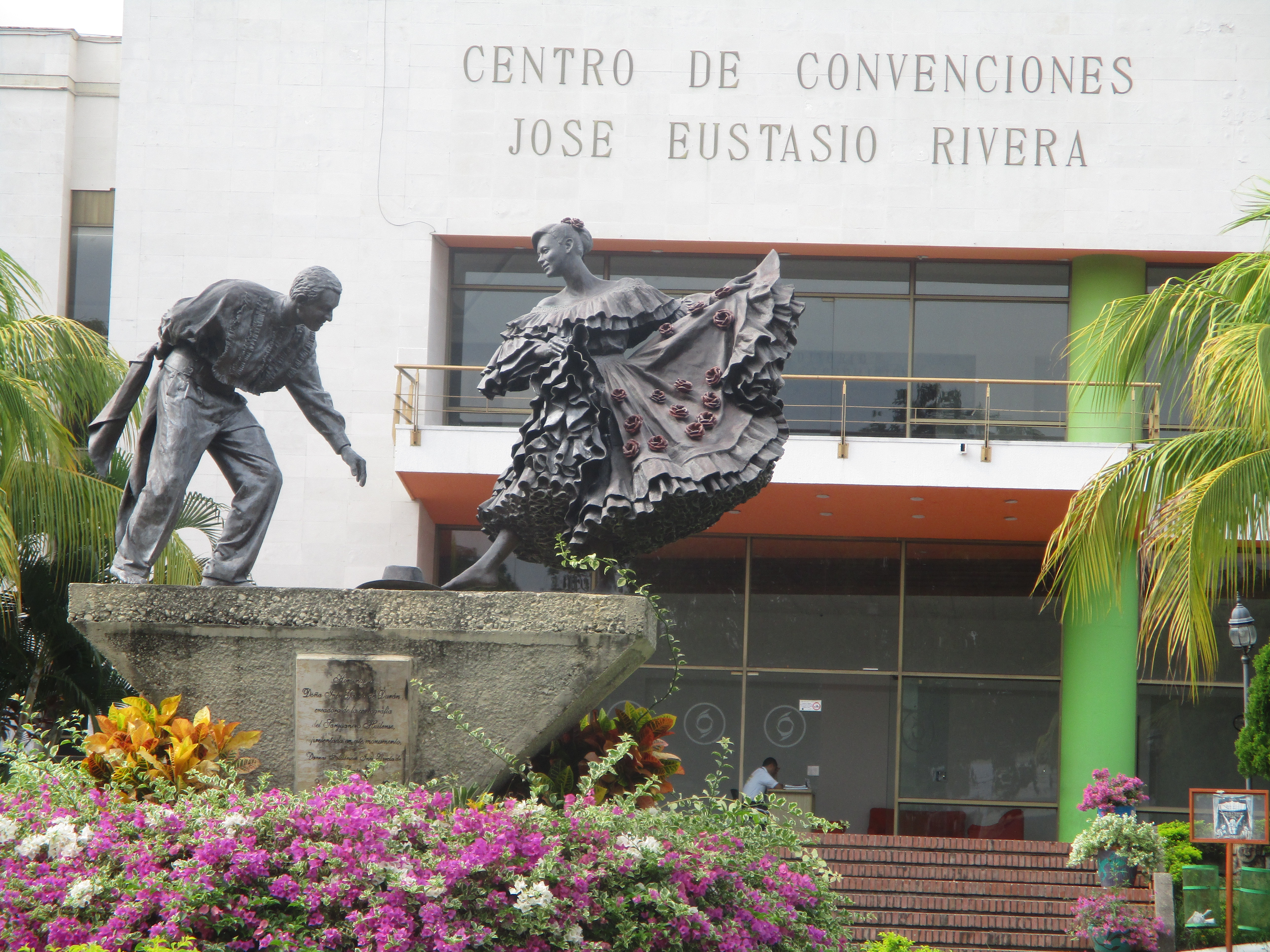 Esta fotografía fue tomada en el municipio colombiano con código 41001.